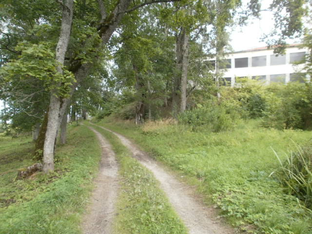 Linnuse põhjanurk. Vasakule jääb järv.